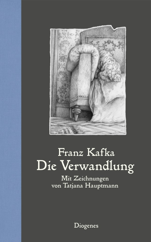 Die Verwandlung, Franz Kafka mit Illustrationen von Tatjana Hauptmann